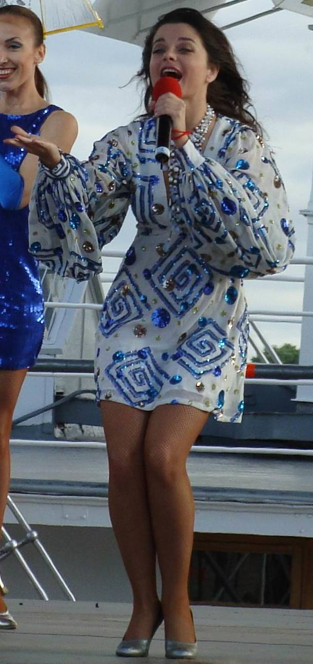 Наташа Королёва в Архангельске выступает совместно с программой Регины Дубовицкой - "Аншлаг" на юбилее, 425-летии города, в воскресенье, летом 28 июня 2009 года.